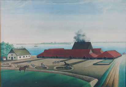 Cathrinesminde Teglværk ca. 1860